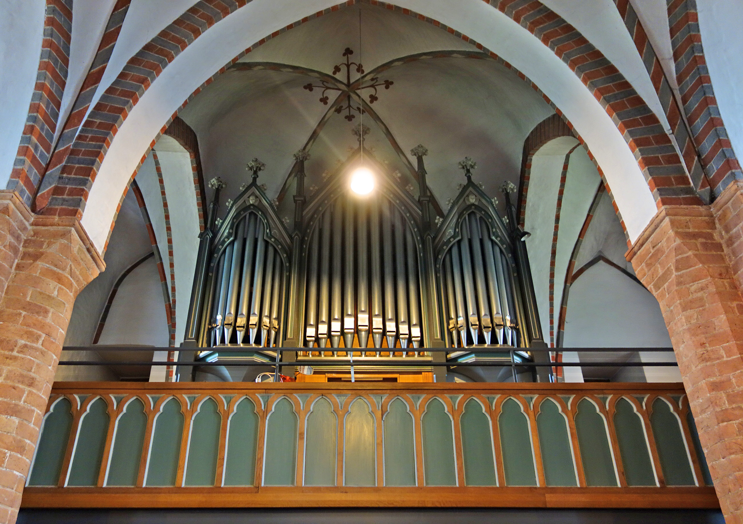 Orgel in Breitenfelde, Schleswig-Holstein, Deutschland